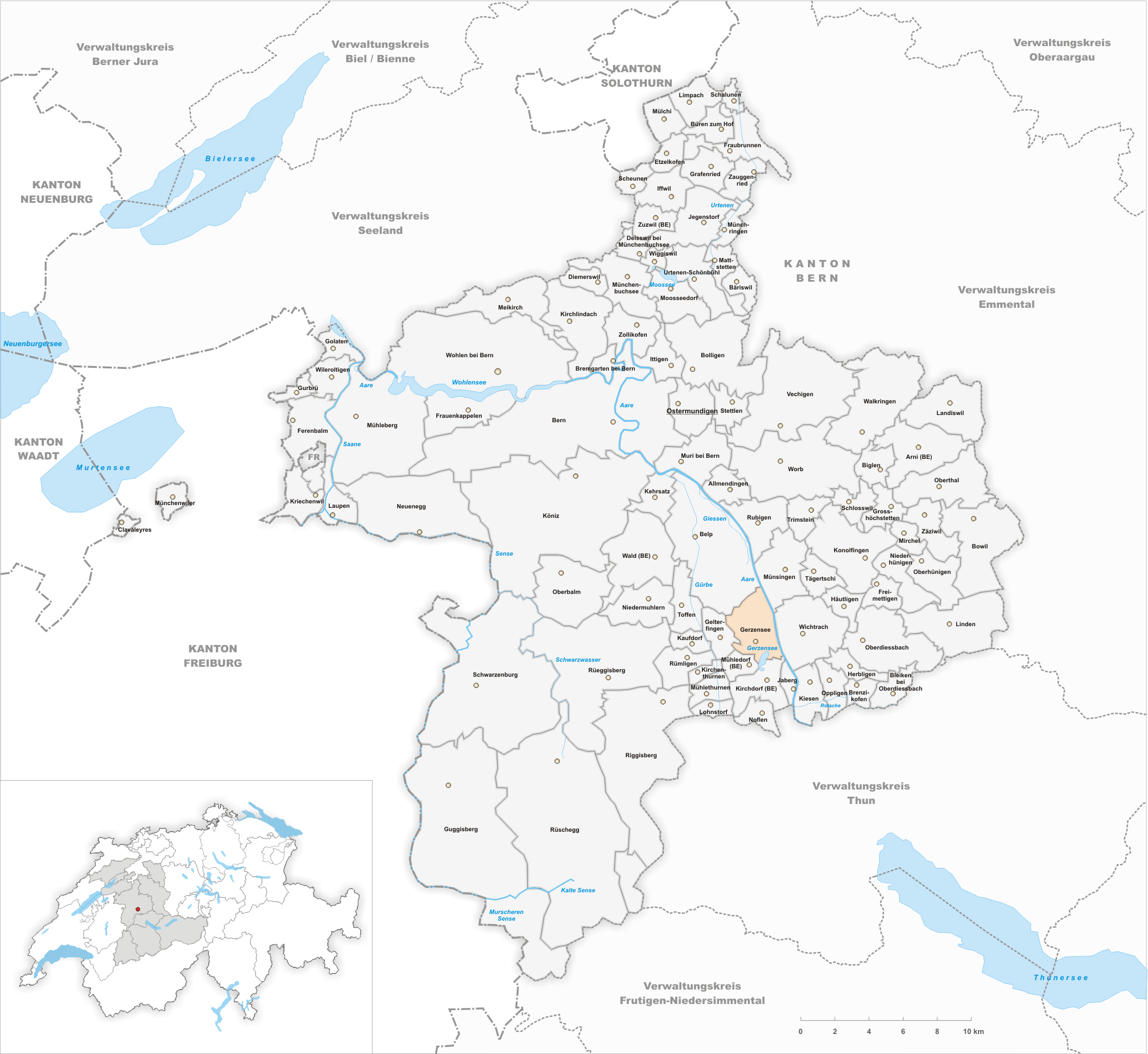 Municipality Belp